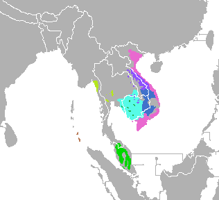 Lenguas mon-khmer Vietnamita Katuico Bahnárico Camboyano Peárico Nicobarés Asli Mon